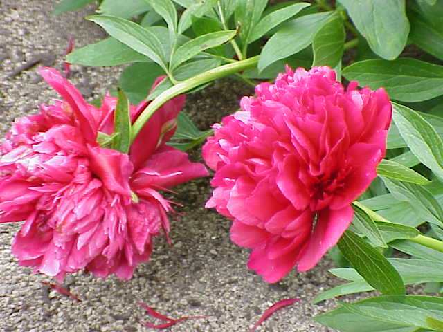 'Species: Paeonia × festiva 'Rubra Plena Family: Paeoniaceae Image No. 1